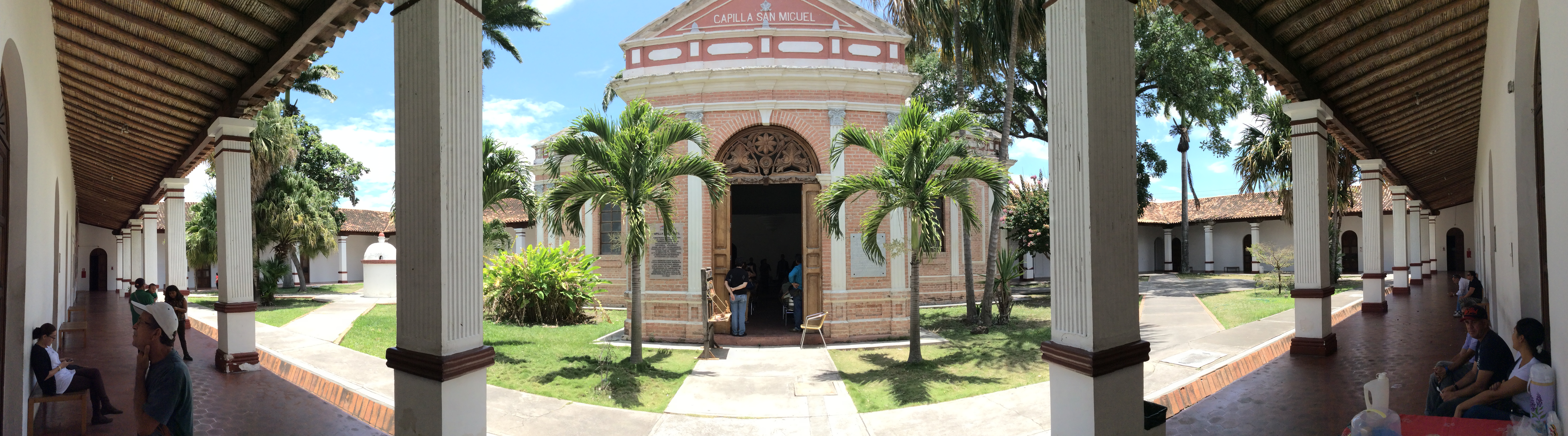 El Museo de Barquisimeto es un lugar donde expresiones artísticas de diferentes localidades pueden ser expuestas a los turistas que los visitan.